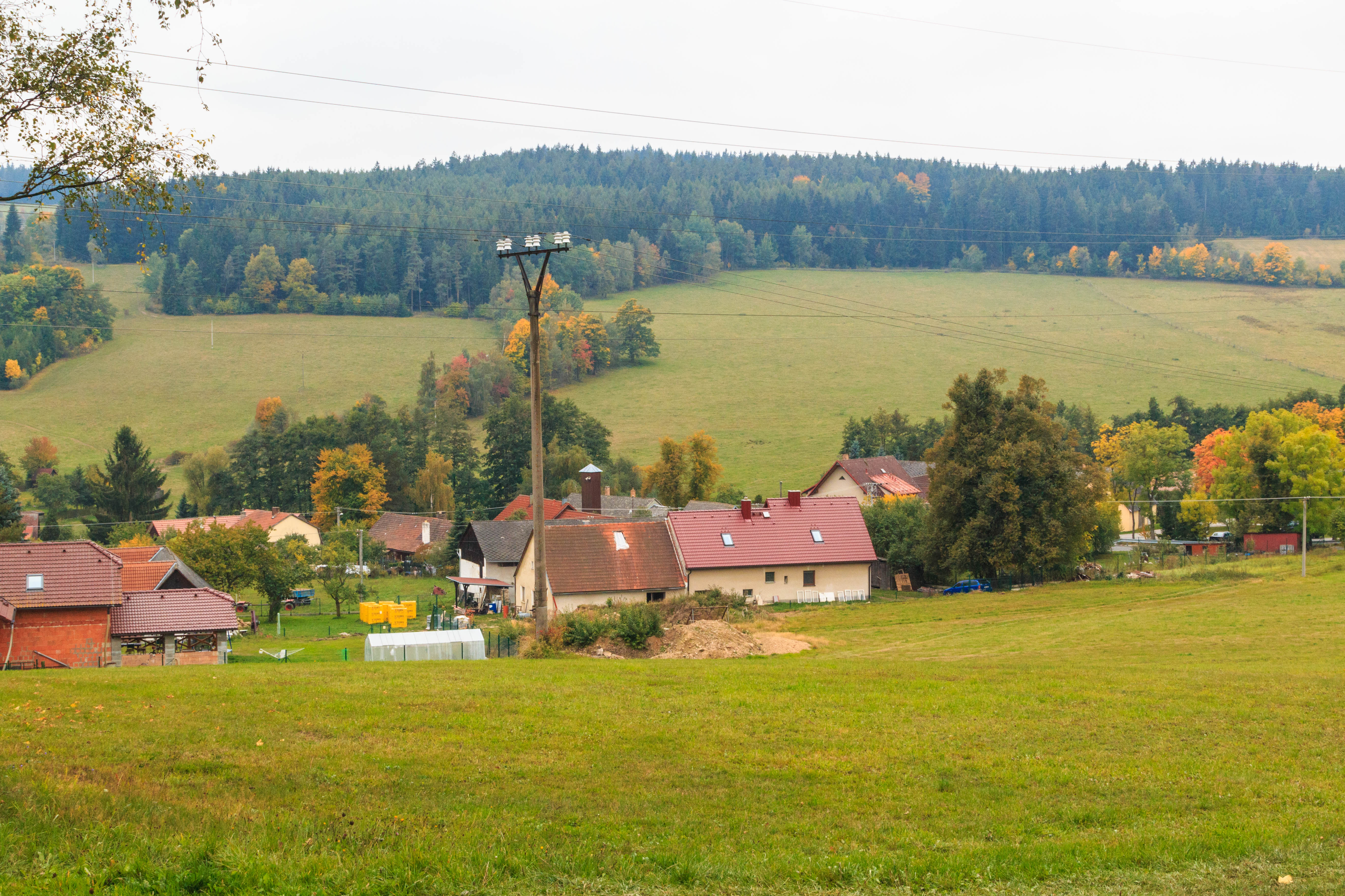 Žárovná - čp. 47